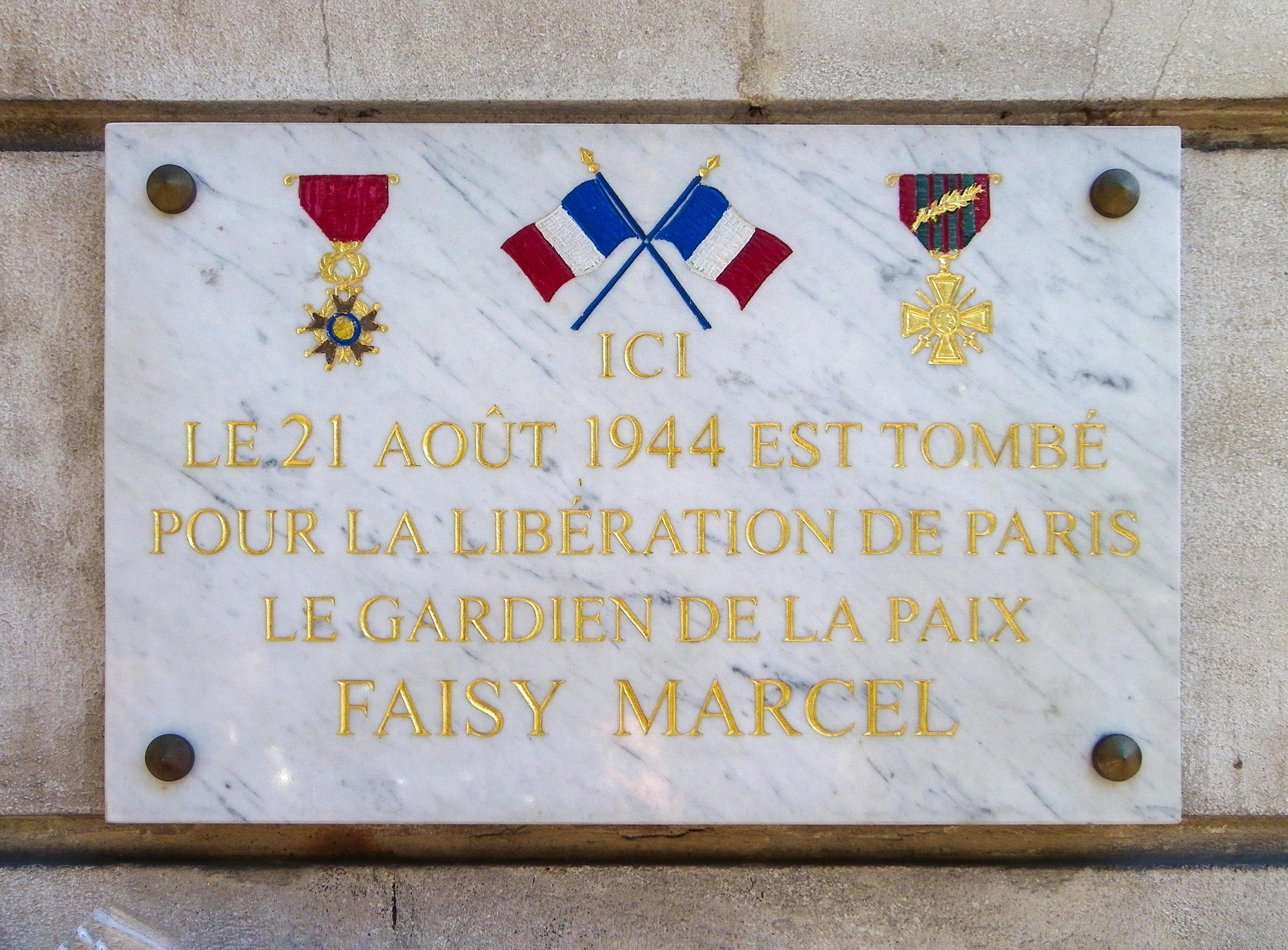 Plaque Faisy Marcel boulevard Malesherbes à Paris